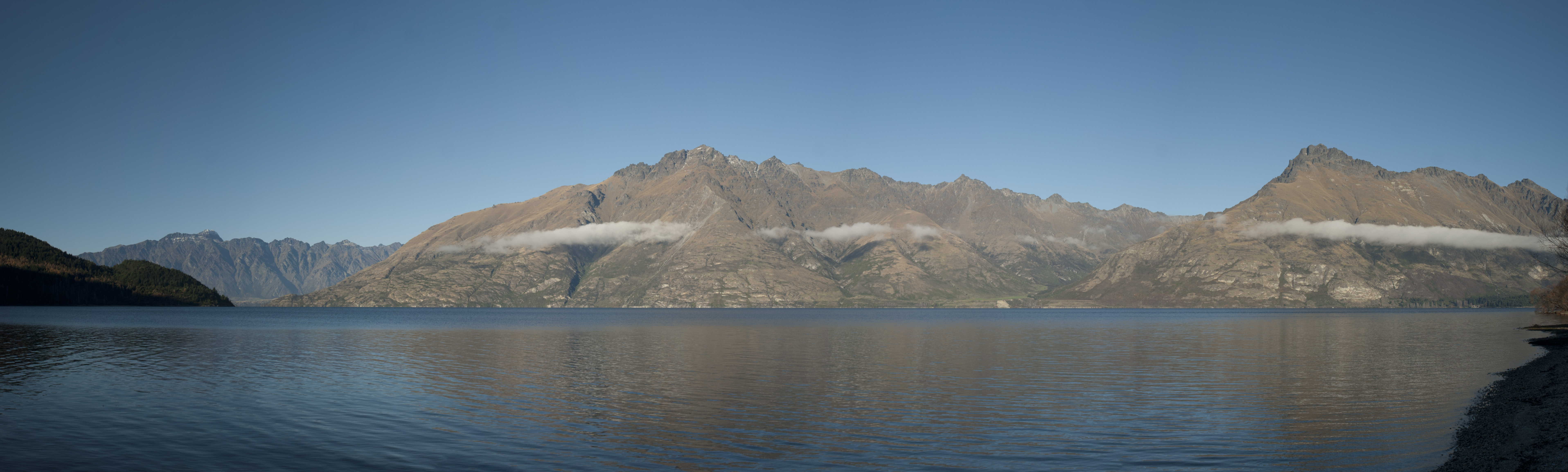 Lake Wakatipu